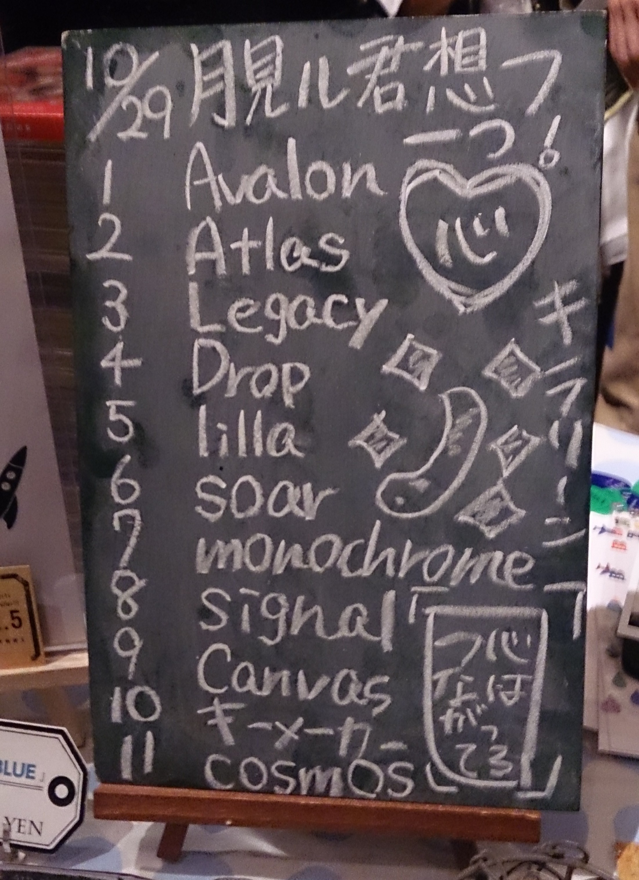 amiinAセトリボード(20161029(1))